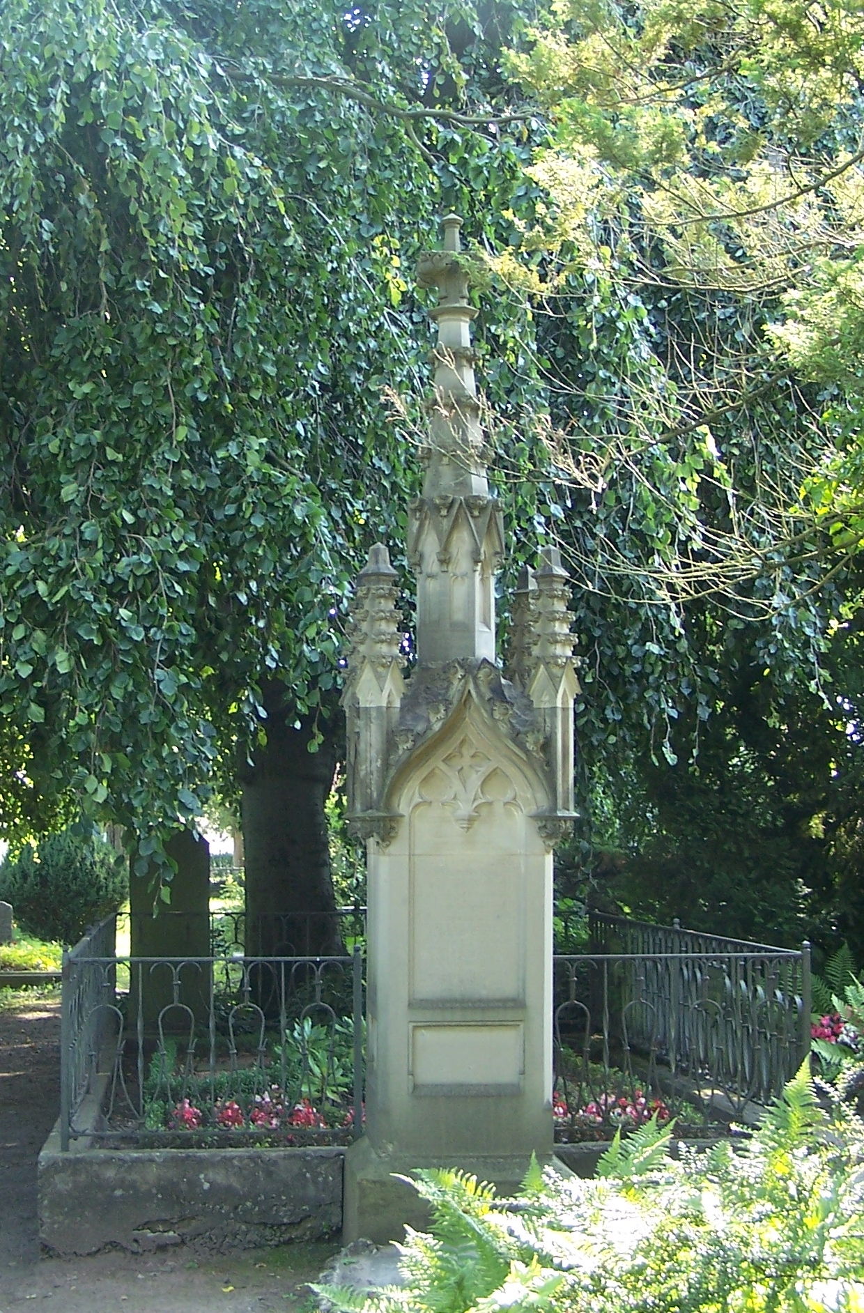 Der Husenfriedhof in Bad Salzungen, Leimbacher Straße, ausgewählte Gräber - Fam. J.Chr. Sulzberger